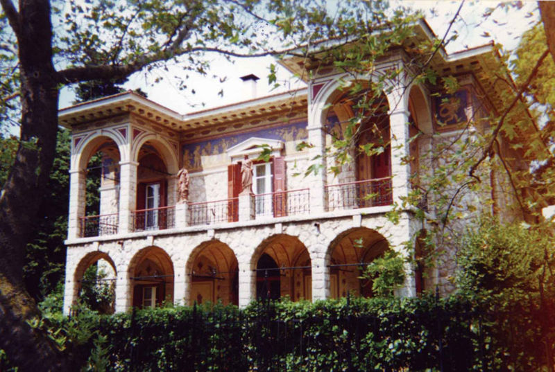 Villa Atlantis